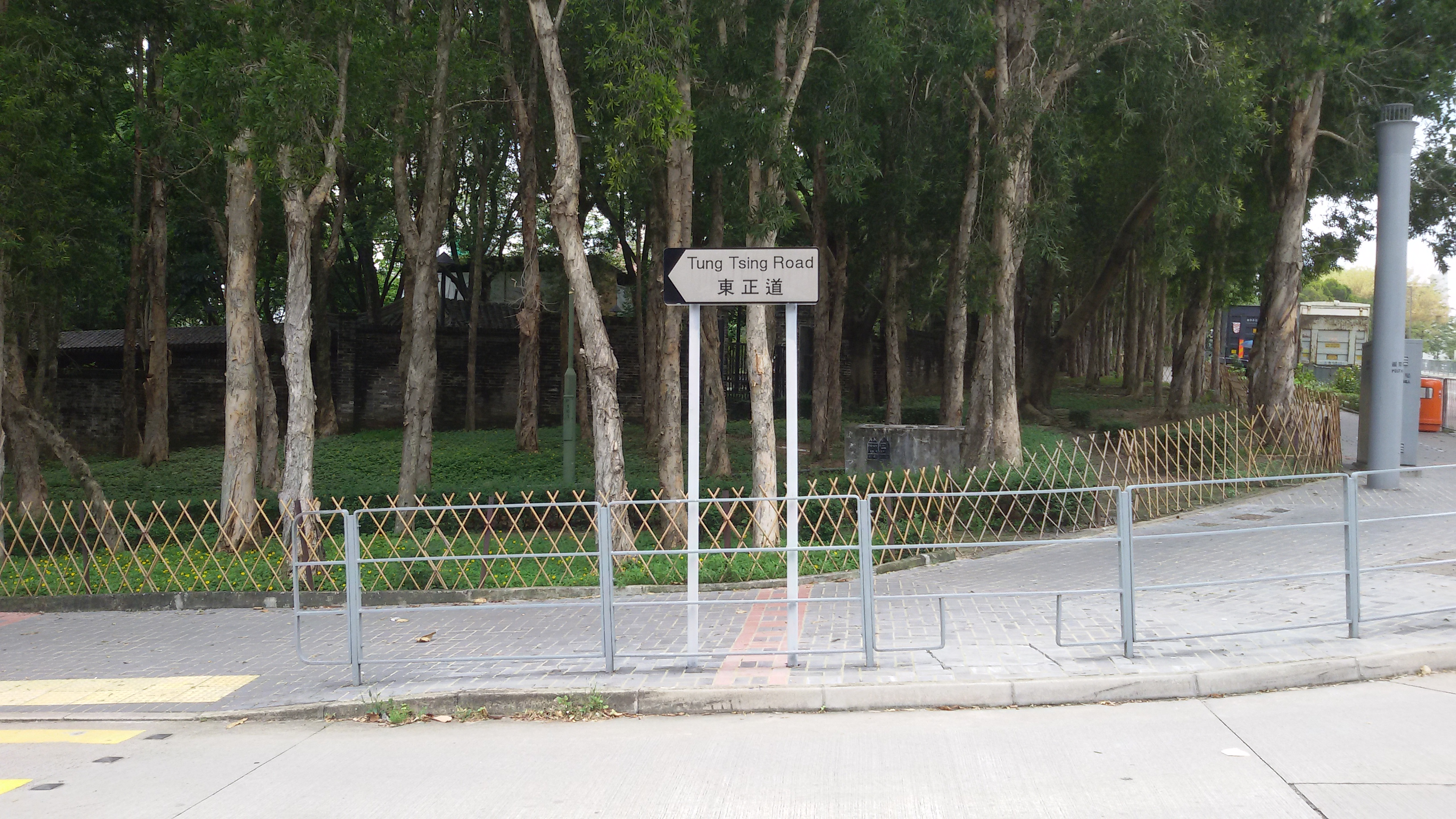 粵語: 東正道嘅路牌